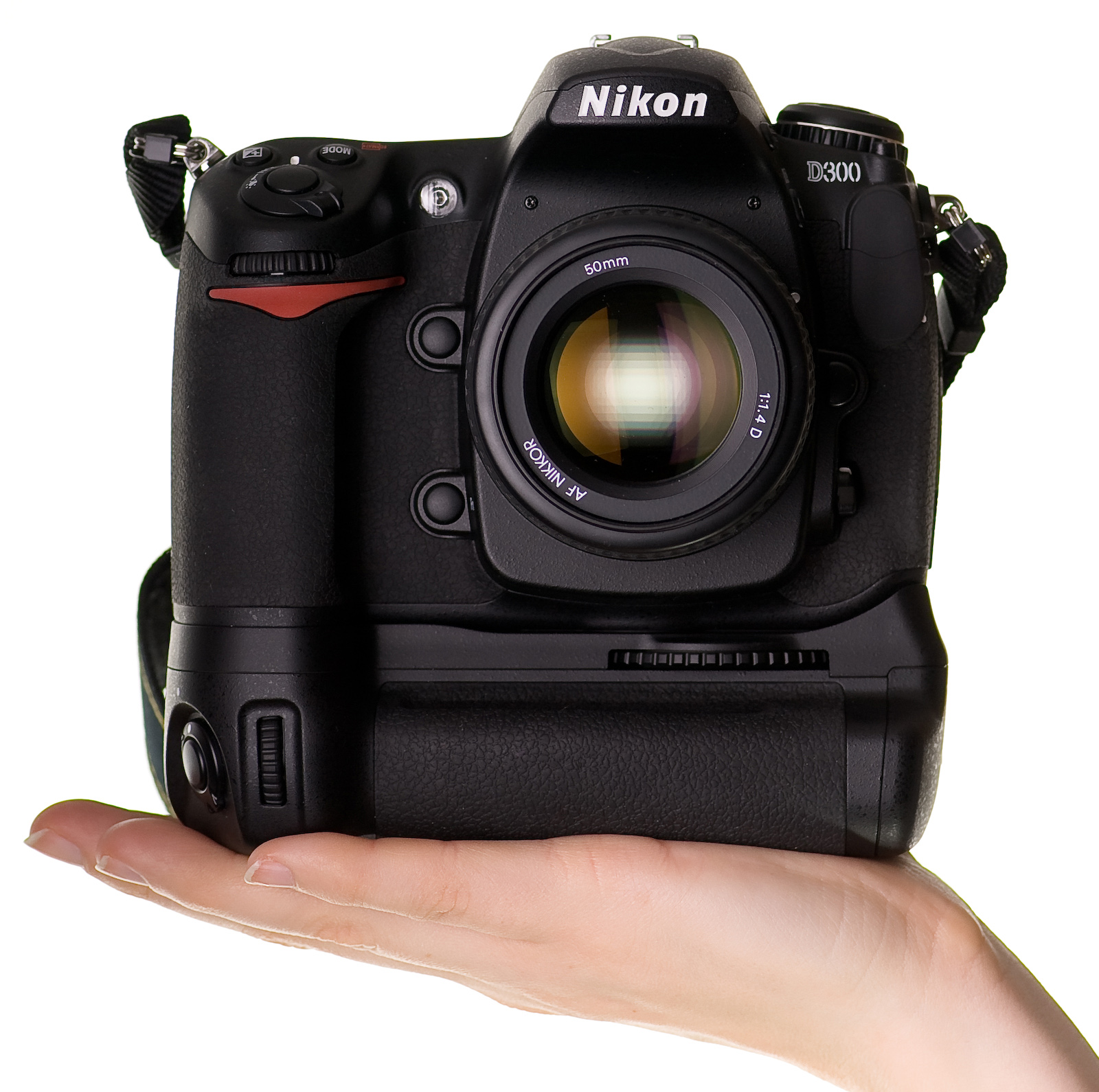 Nikon D300 digital SLR camera.